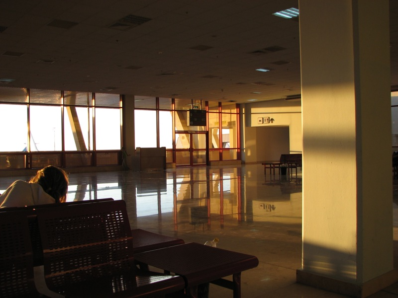 Ashgabat Airport, Turkmenistan. Солнце заходит, а до вылета ещё 6 часов